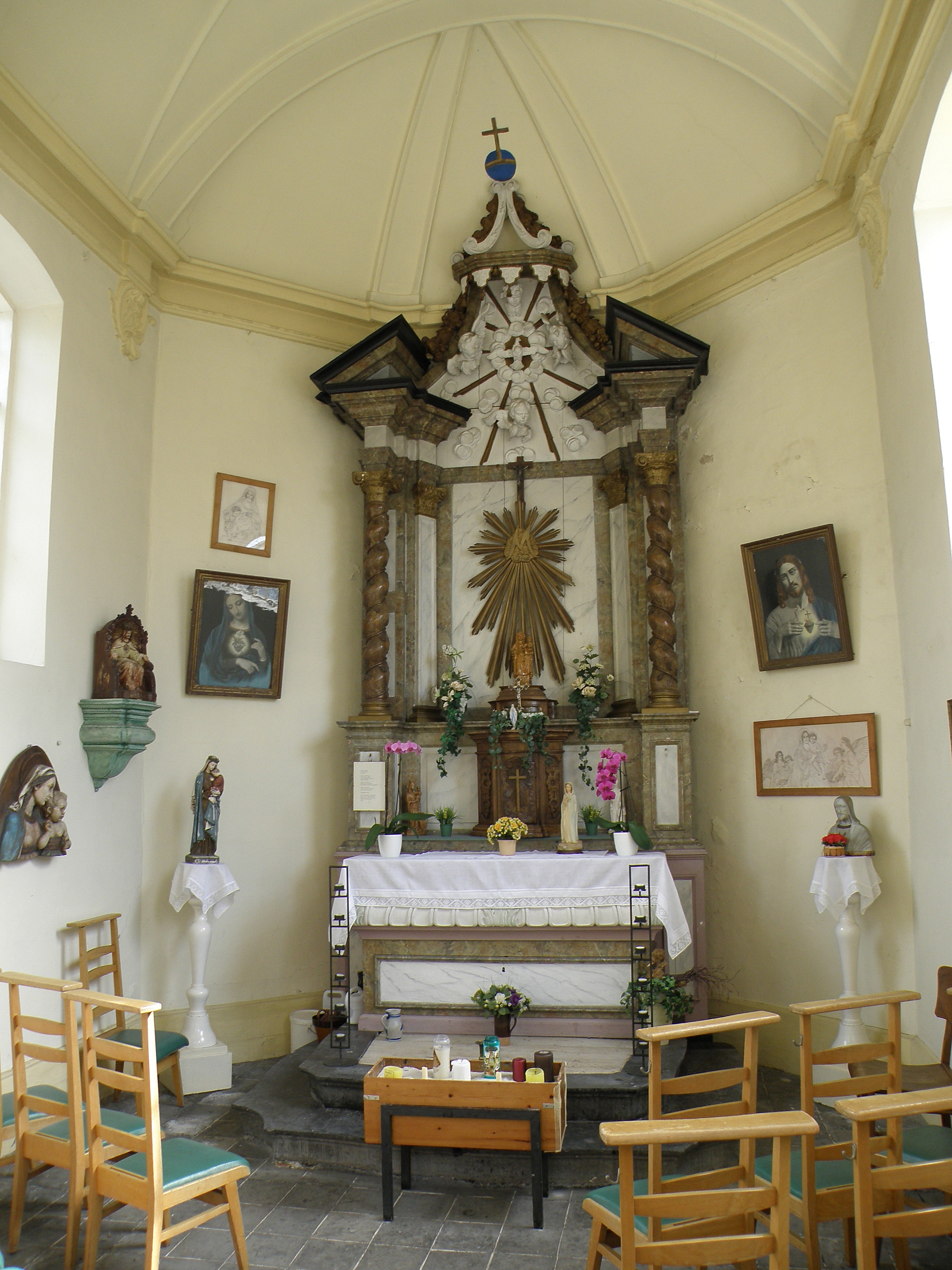 Kontich (prov. Antwerpen, België). Reepkenskapel.